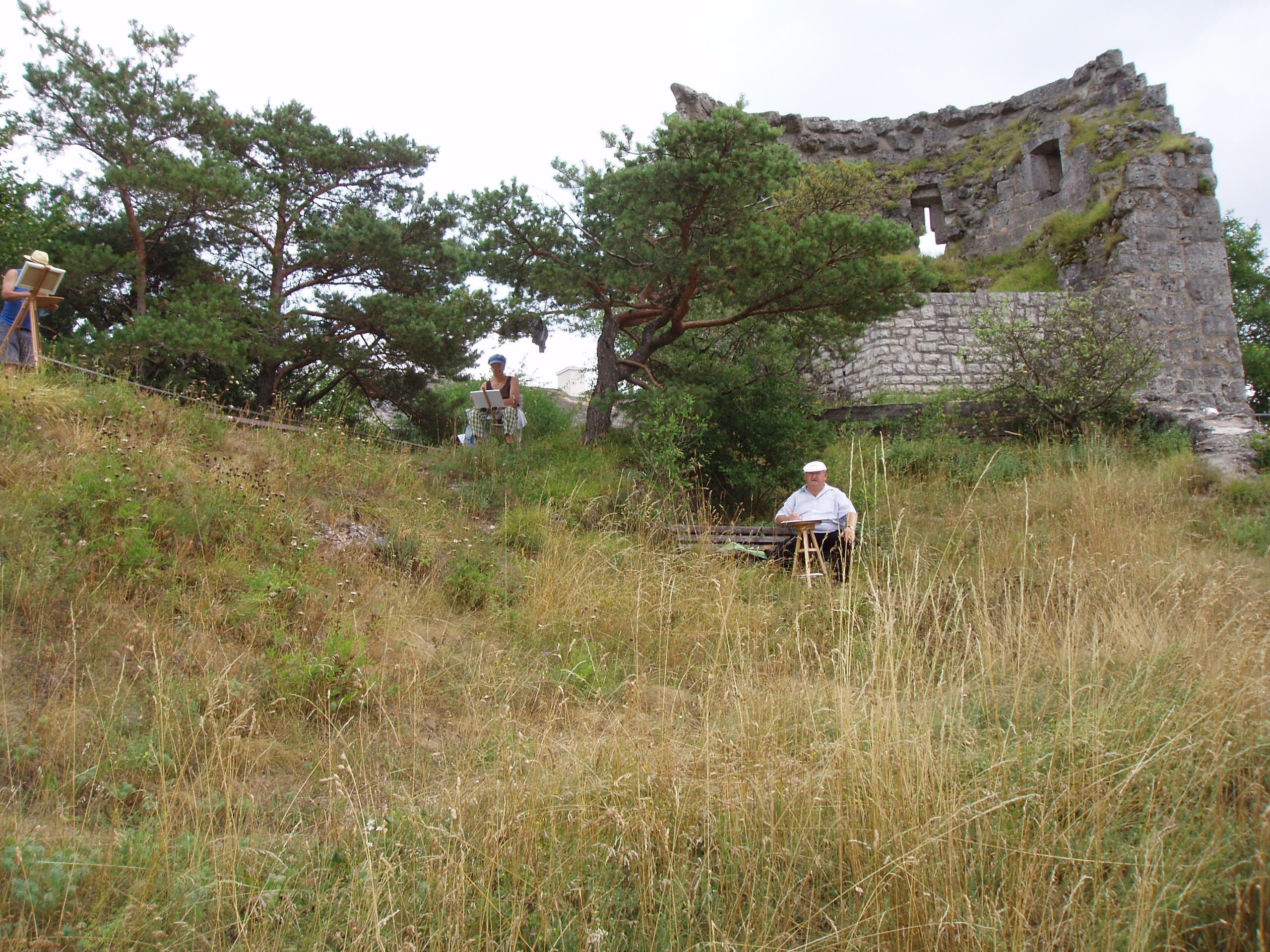 Areal des ehemaligen Schlosses Arnsberg über dem Altmühltal mit Bergfried.jpg